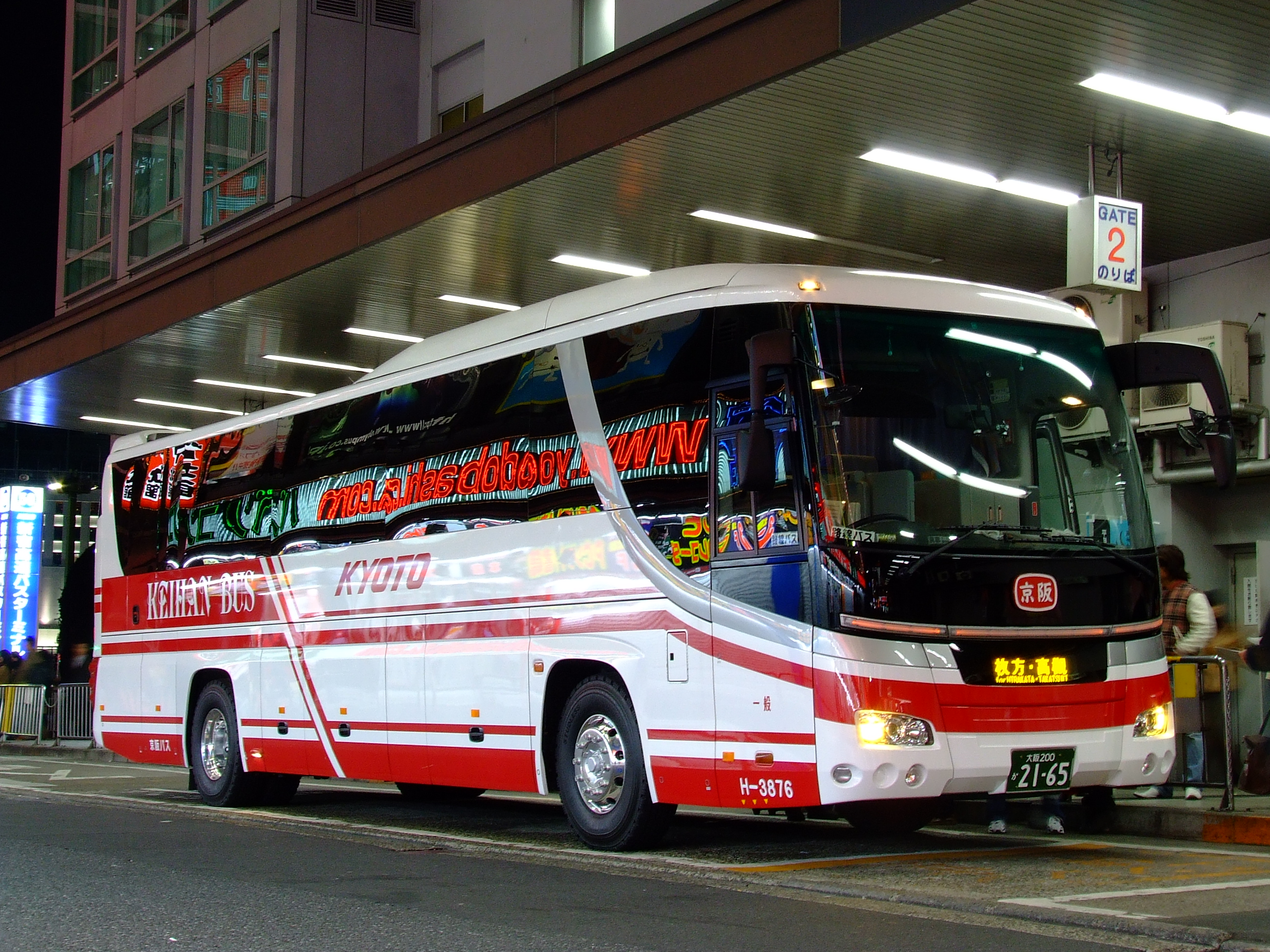 京阪バスの夜行高速バス「東京ミッドナイトエクスプレス宇治号」 3月から導入されたニューセレガ 新宿高速バスターミナルにて